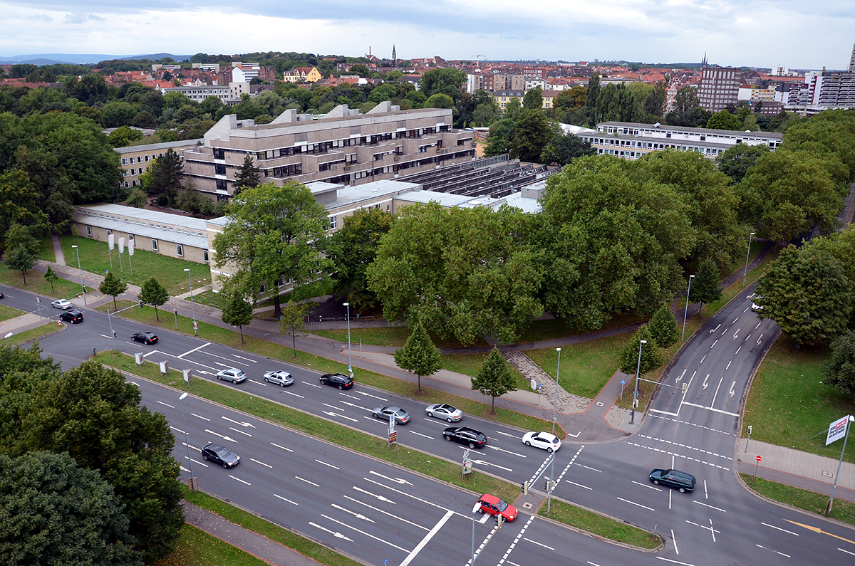 Teil desBerufsschulzentrums Hannover ist die Otto-Brenner-Schule, vollständiger Name "Berufsbildende Schule Metalltechnik Elektrotechnik der Region Hannover, Otto-Brenner-Schule (bbs me)". Der Gebäudekomplex an der Ohestraße zwischen der Ihme, der Gustav-Bratke-Allee und der Lavesallee im Stadtteil Calenberger Neustadt wurde hier von der Waterloosäule aufgenommen. An der Stelle der Berufsschule stand bis 1971 das Gebäude Ohestraße 8/9, für das Berufsschüler das Mahnmal zur Erinnerung an jüdisches Leben in der Ohestraße errichteten ...